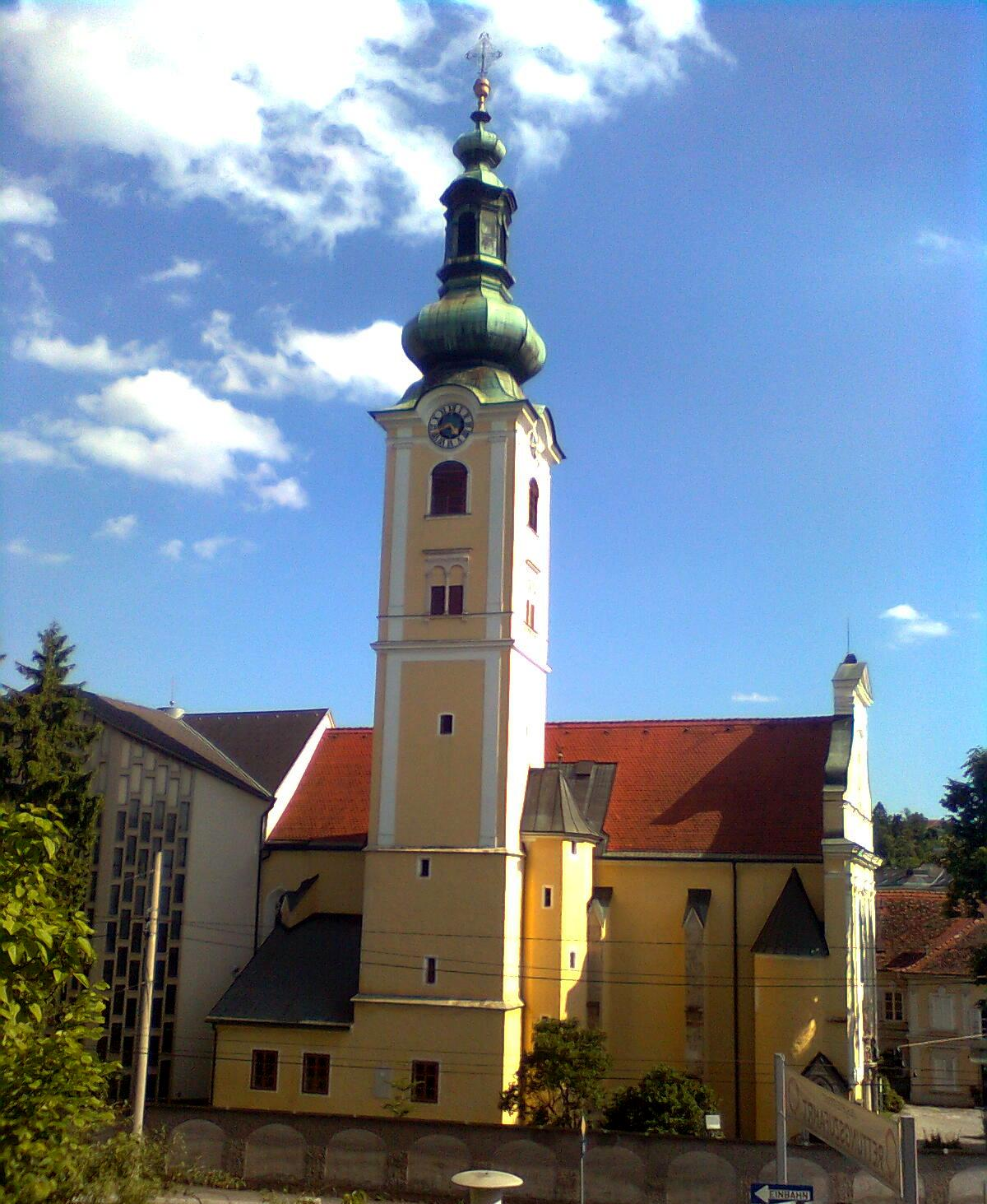 Kirche Graz-Sankt Leonhard vom LKH Graz aus gesehen